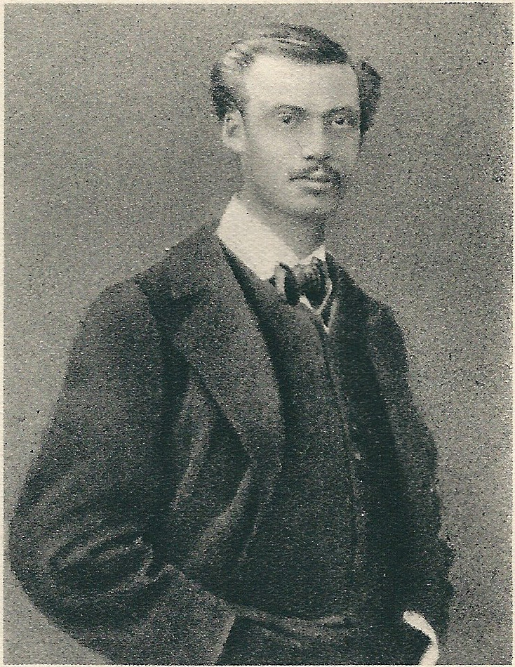 Auguste Renoir, photographie de 1861